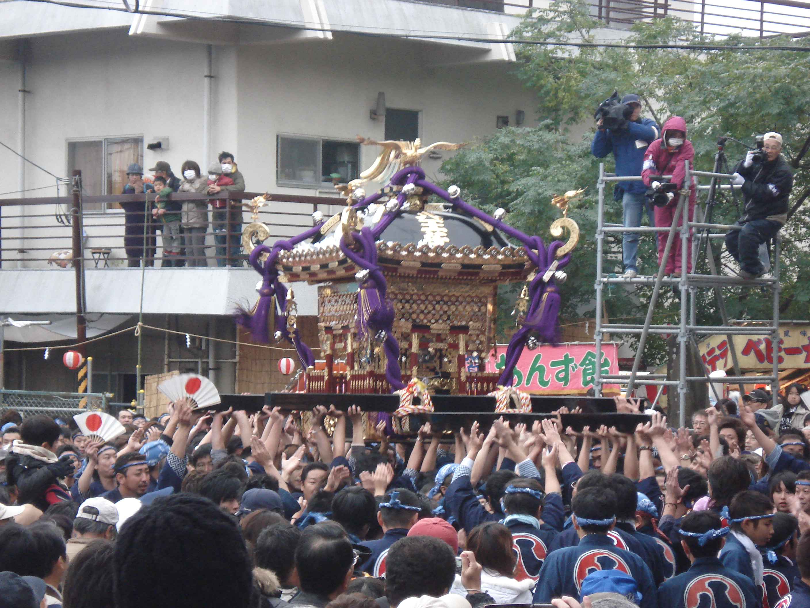 下総三山の七年祭り。日本の千葉県船橋市三山にある二宮神社で、丑年と未年にあたる年に開催される大祭である。